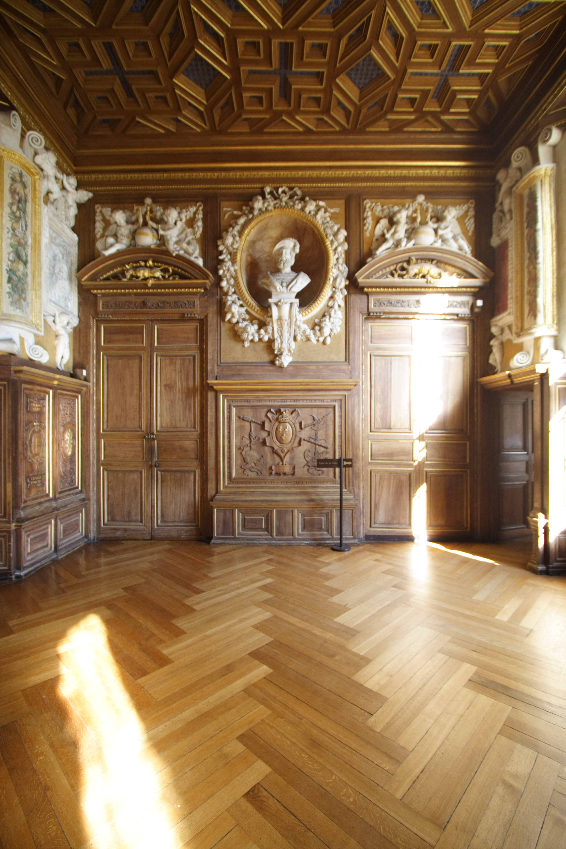 Château de Fontainebleau(Fontainebleau, France)